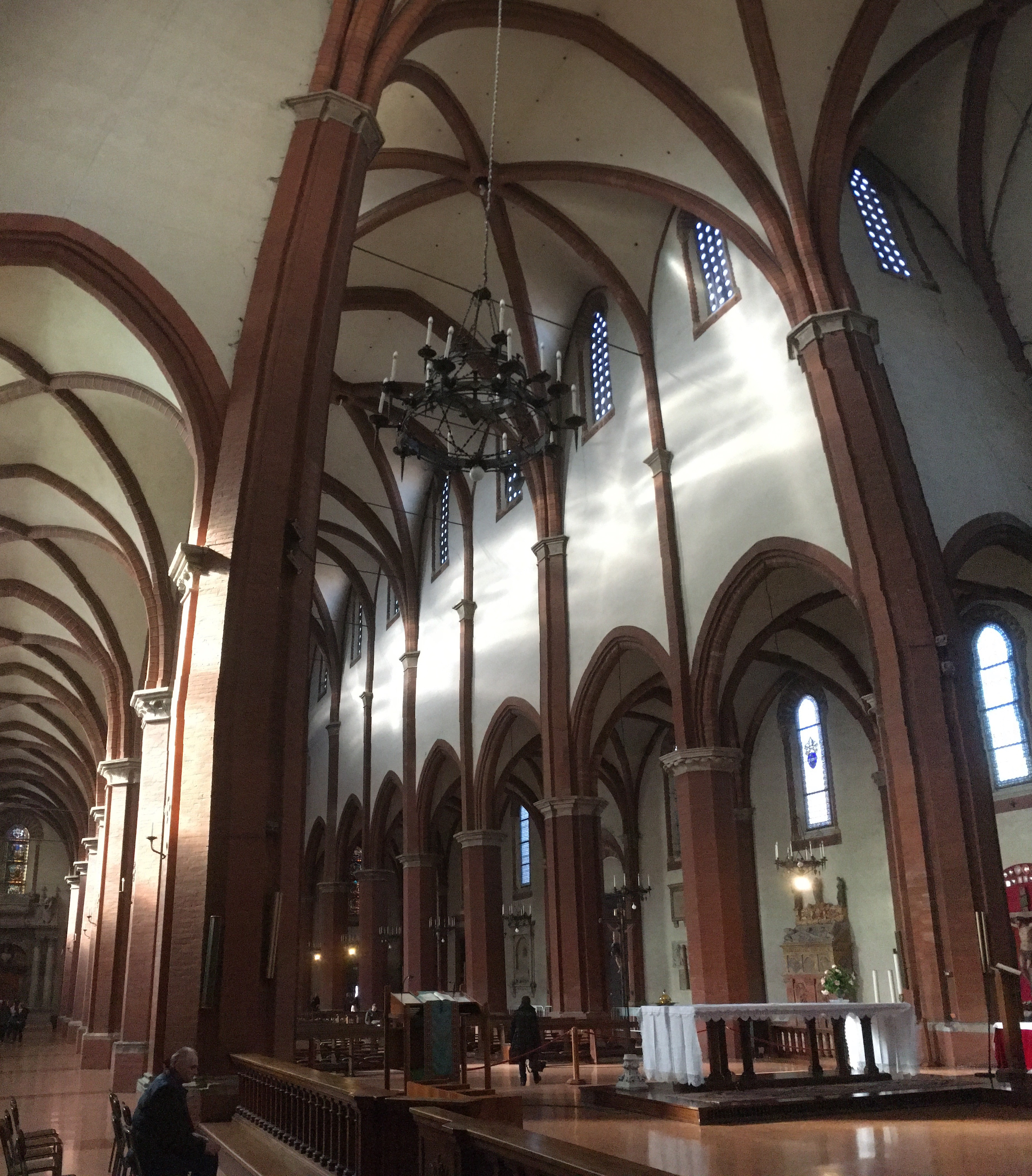 Bolonia, San Francesco, interior.